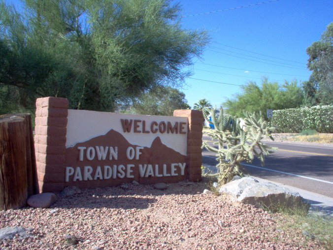 Welcome sign in Paradise Valley Arizona